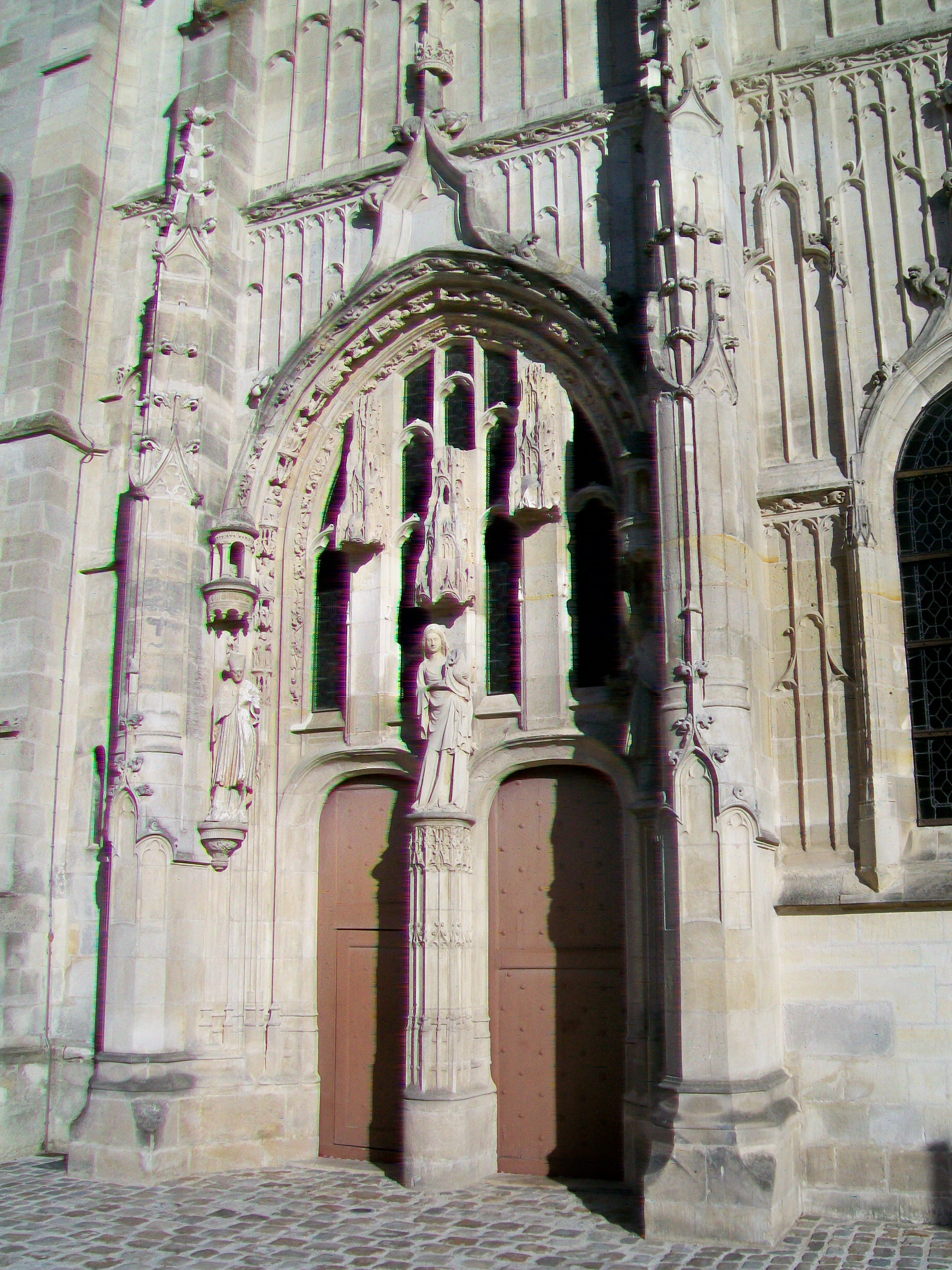 Le portail principal sur la façade nord-ouest.